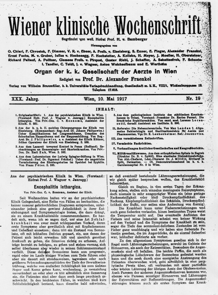 Wiener Klinische Wochenschrift, 1917